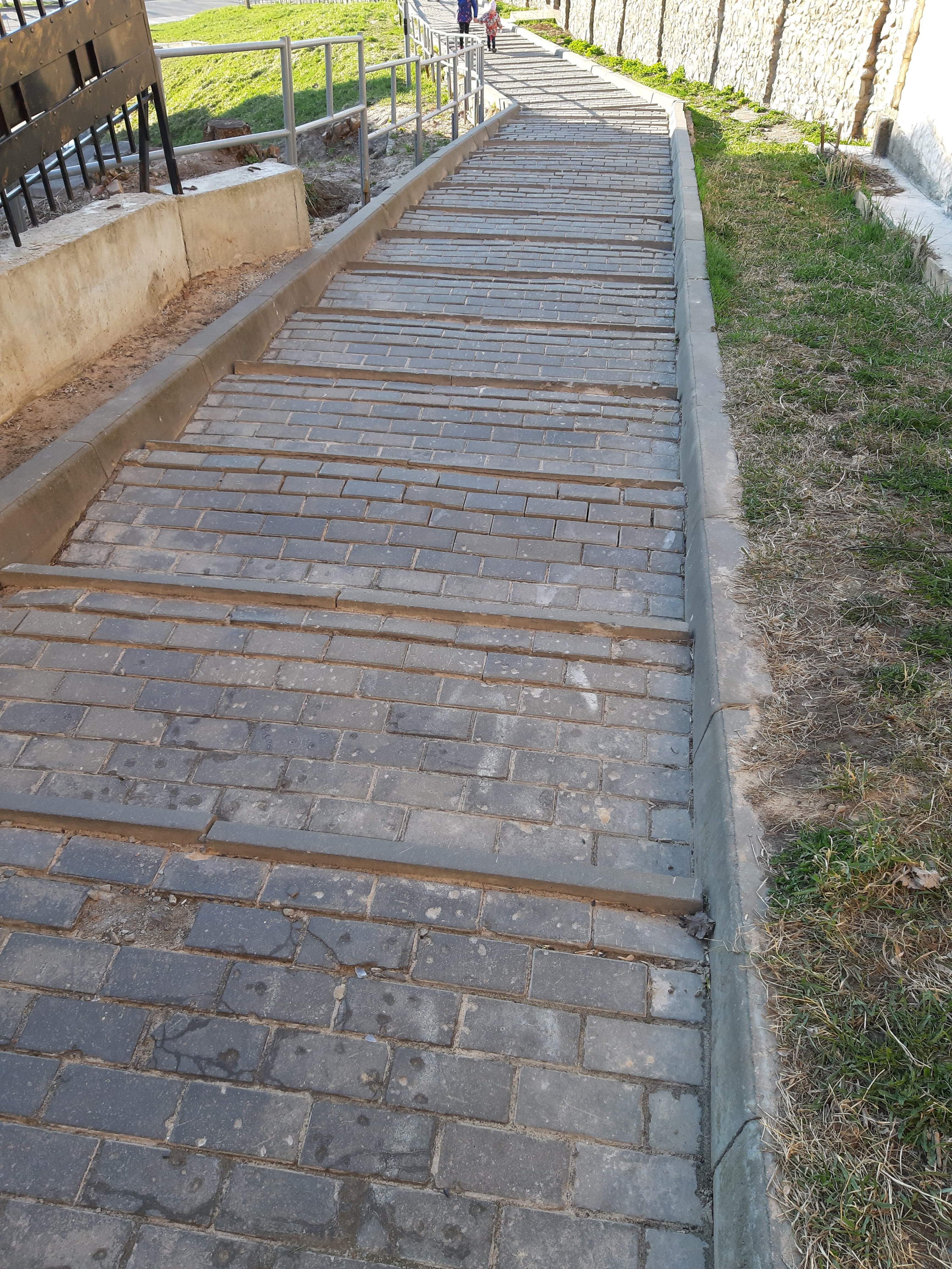 Магілёў. Рэспубліканскі завулак (лесвіца да Дубравенкі)